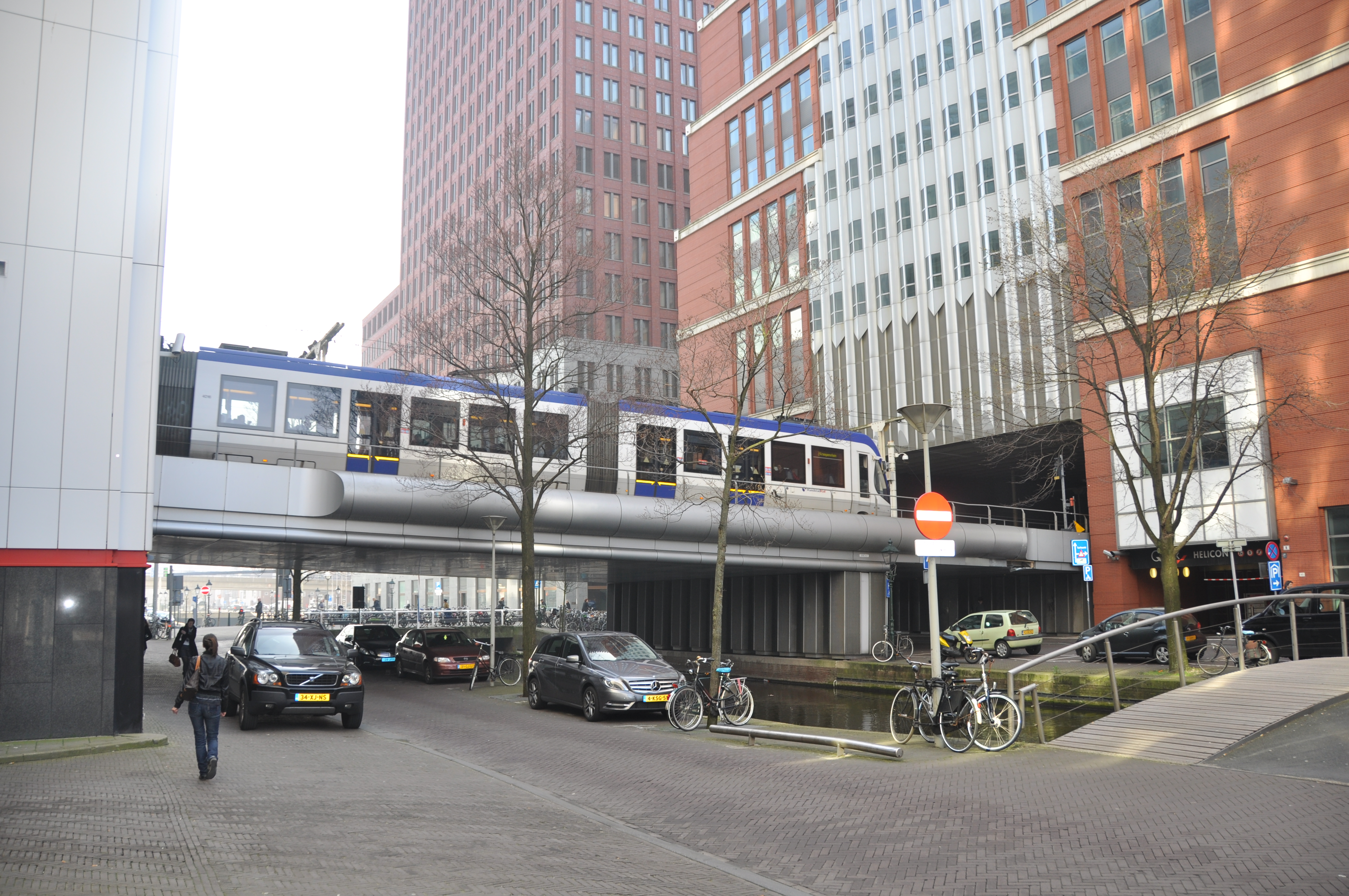 De trambrug in Den Haag.